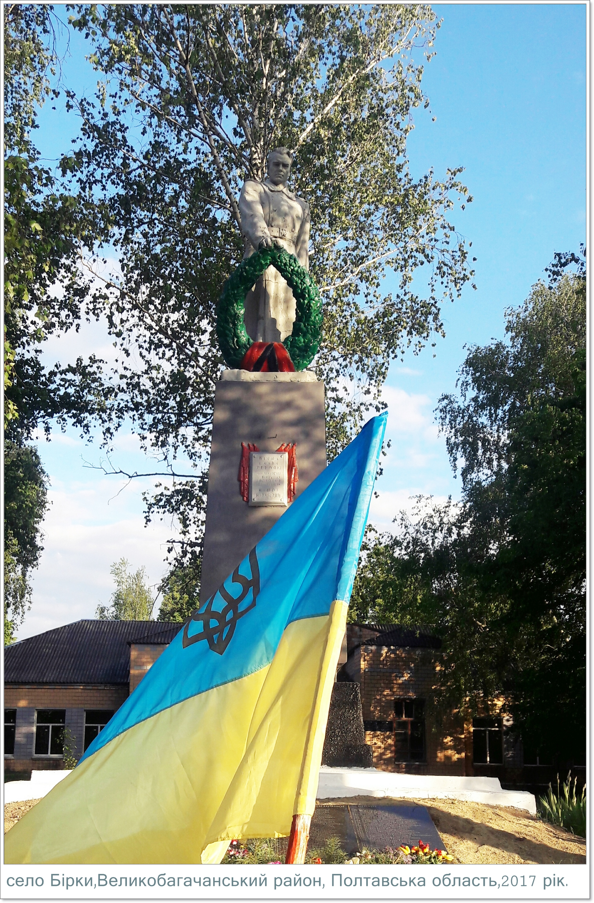 Вічна слава героям!